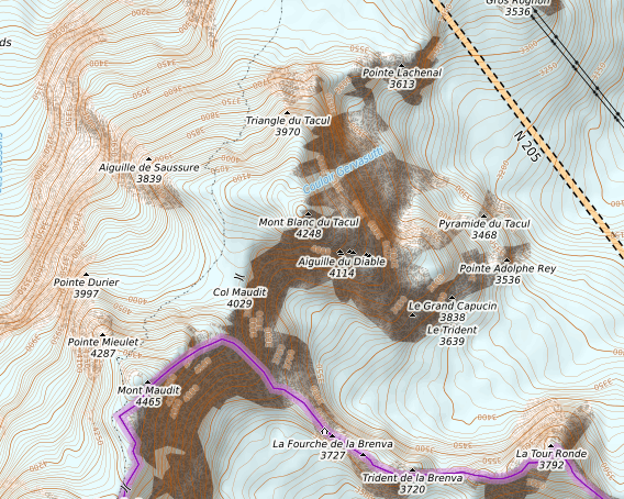 carte réalisée sur umap This map may be incomplete, and may contain errors. Don't rely solely on it for navigation.